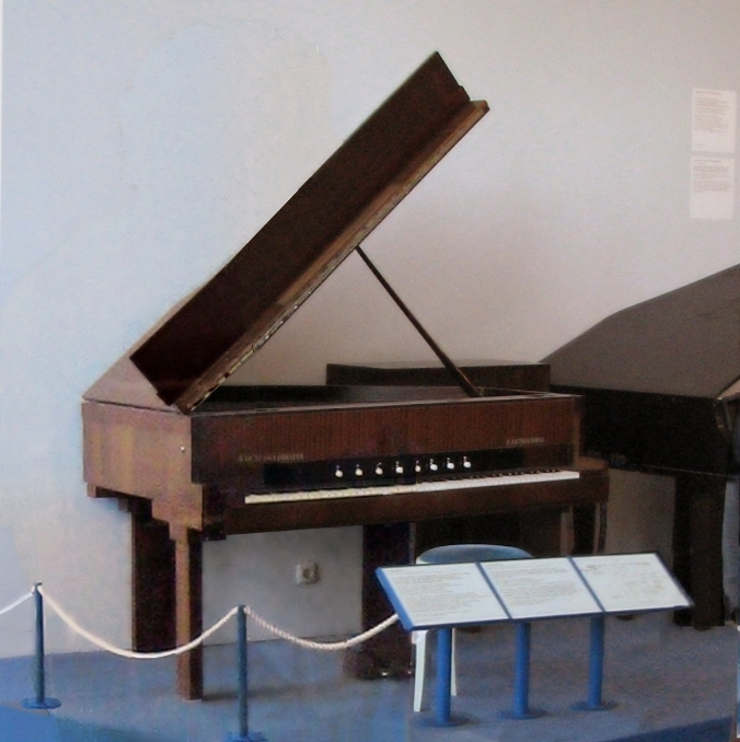 Vierling-Förster Ekektrochord (1937) developed by Oscar Vierling from 1928 to 1935 [1] manufactured by August Förster in 1937 [2] References ↑ Wolfgang Voigt (1988,). "Oskar Vierling, ein Wegbereiter der Elektroakustik für den Musikinstrumentenbau". Das Musikinstrument 37 (1/2): 214-221. Wolfgang Voigt (1988,). "Oskar Vierling, ein Wegbereiter der Elektroakustik für den Musikinstrumentenbau". Das Musikinstrument 37 (2/3): 172-176. ↑ Elektronische Musik - Elektrophone - Elektronische Klaviere. Ausstellungen. Deutsches Museum.